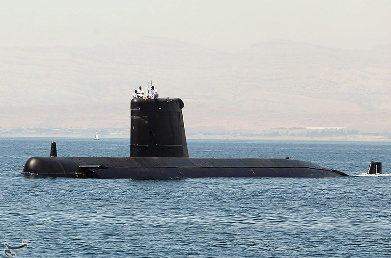 حشمت - رزمایش مشترک دریایی ایران و پاکستان در تنگه هرمز